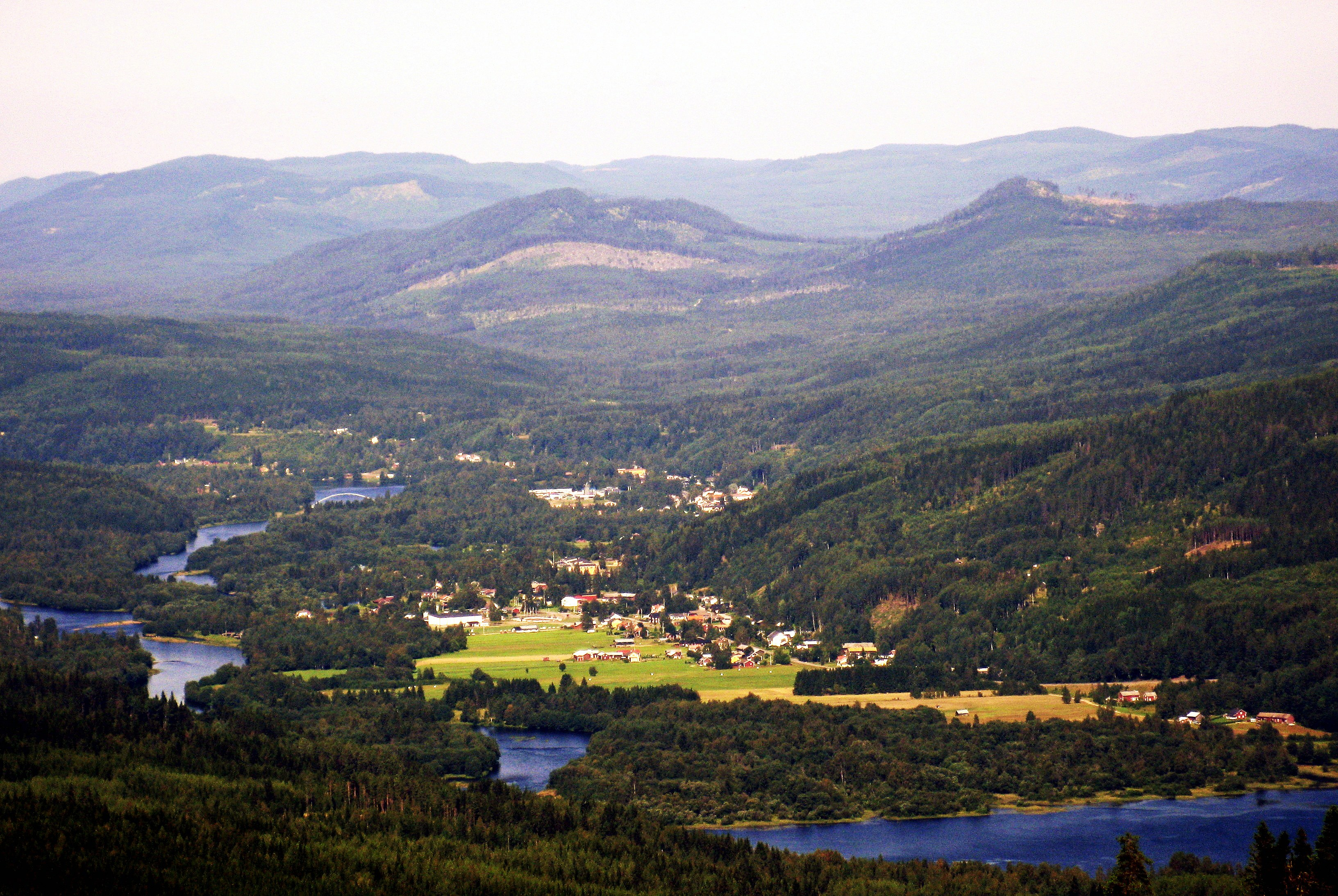 Sysslebäck foto från Branäsberget